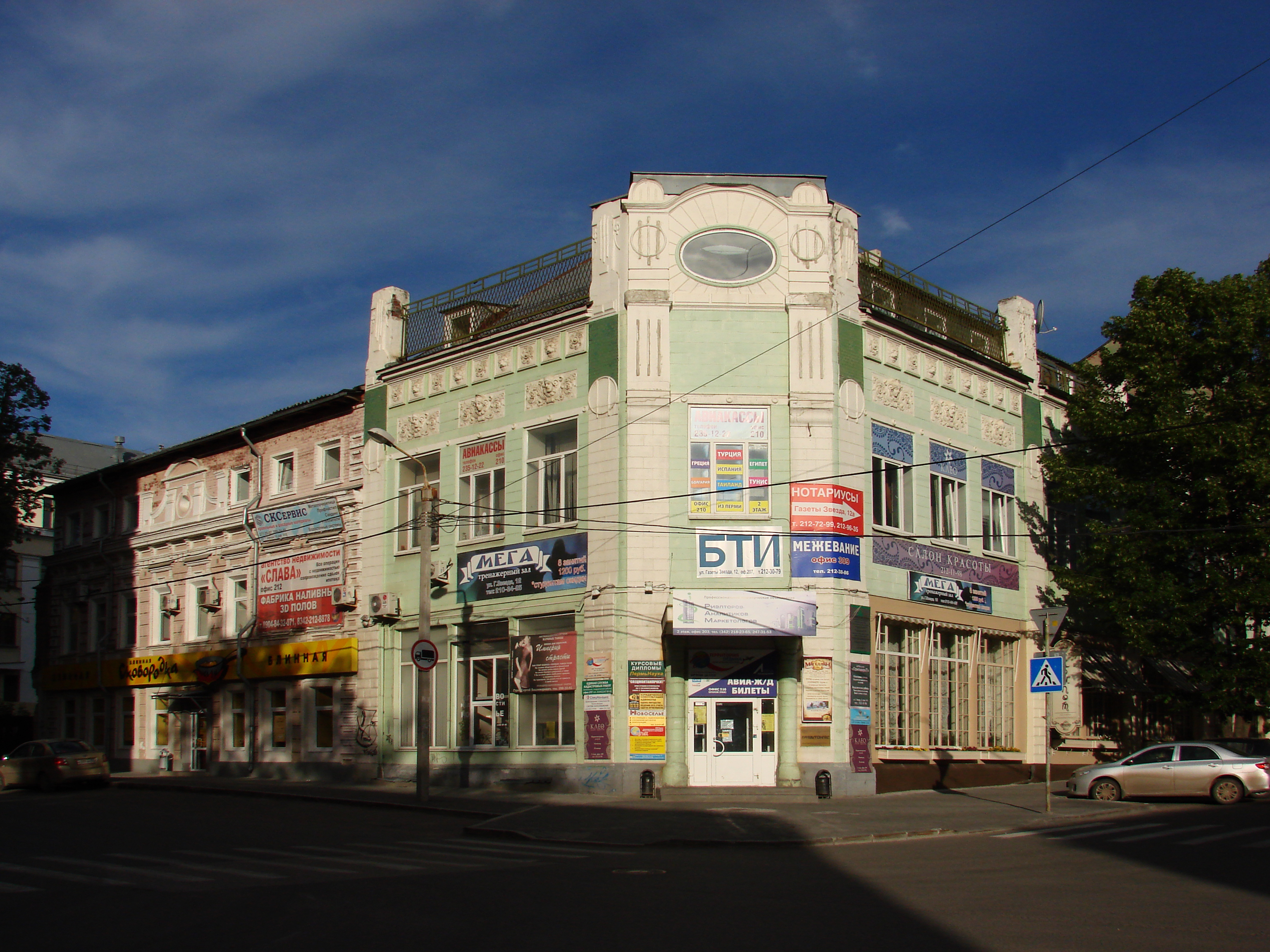 Дом В.К.Пермяковой кон.XIX в., архитектор П.К.Гаврилов Пермь, улица Советская, 37